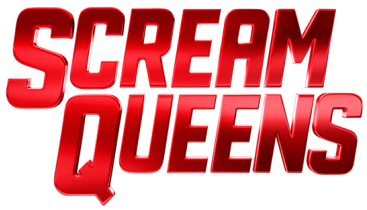 Logo de la série.